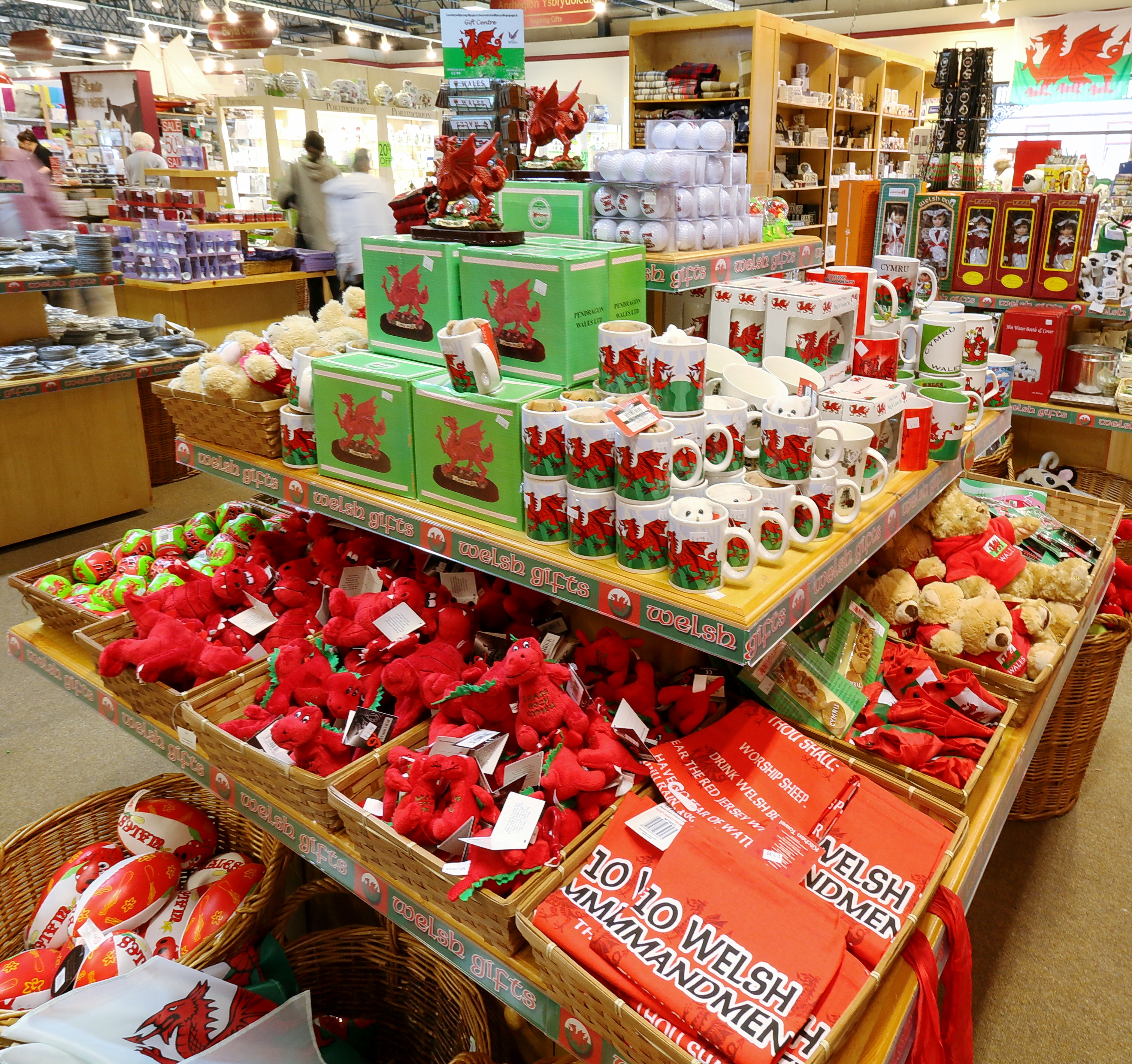 James Pringle Weavers of Llanfairpwllgwyngyll, Llanfairpwllgwyngyllgogerychwyrndrobwllllantysiliogogogoch, Holy Island, Anglesey, Wales